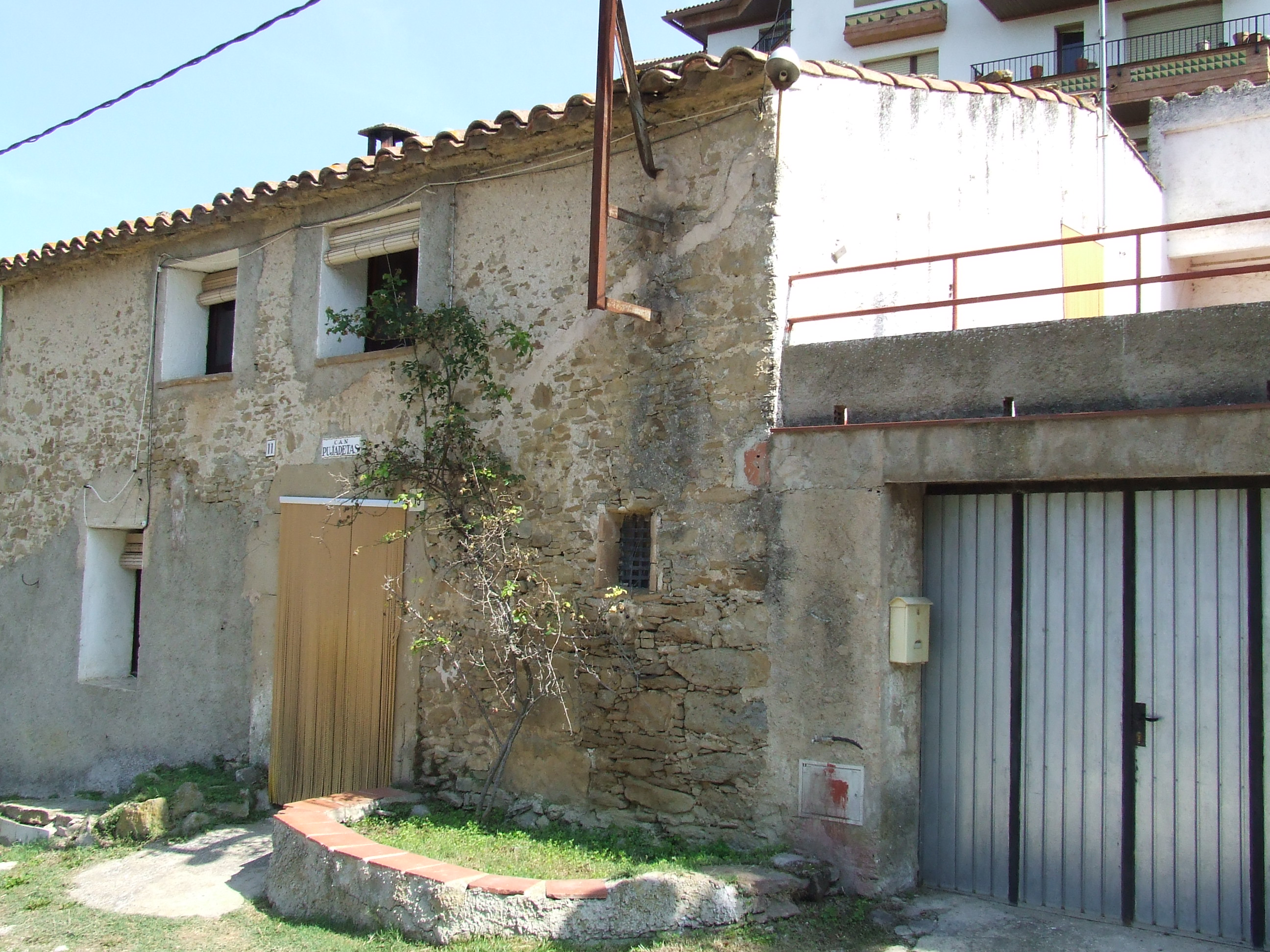 Cal Pujadetes (Castellcir, Moianès)